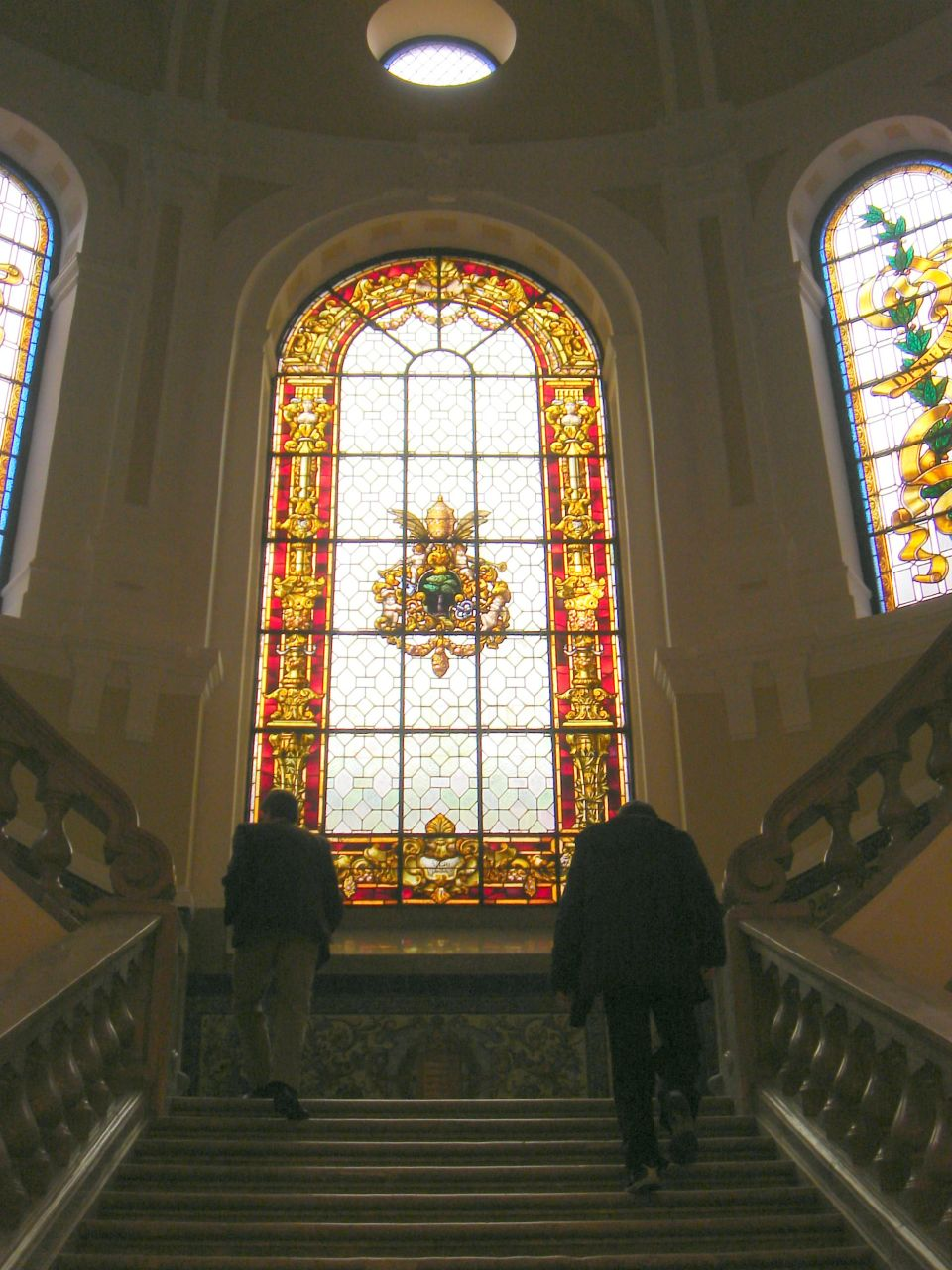 Constantino Candeira: steinerne, mit Balustraden gesäumte geradläufige Treppenflucht (1941) die sich am Treppenabsatz in zwei Arme unterteilt, Treppenhaus der Universität von Valladolid, Spanien.